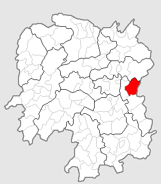 Map of LiLing,Hunan,China